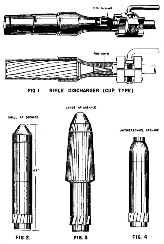 tromblon Schiessbecher et grenades à fusil allemandes antipersonnel et antichars